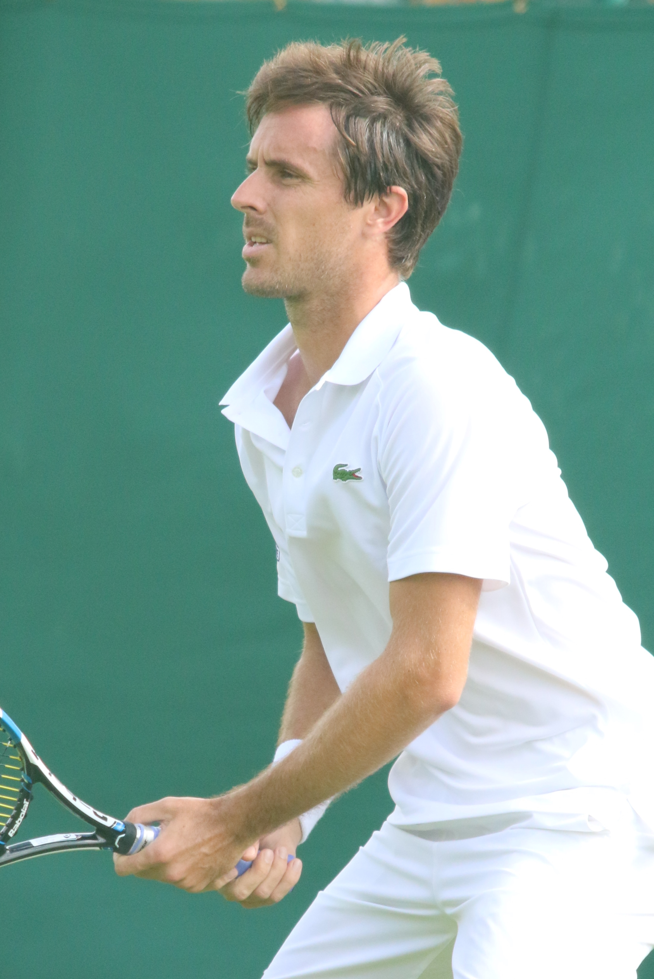 Roger-Vasselin WMQ16 (8)